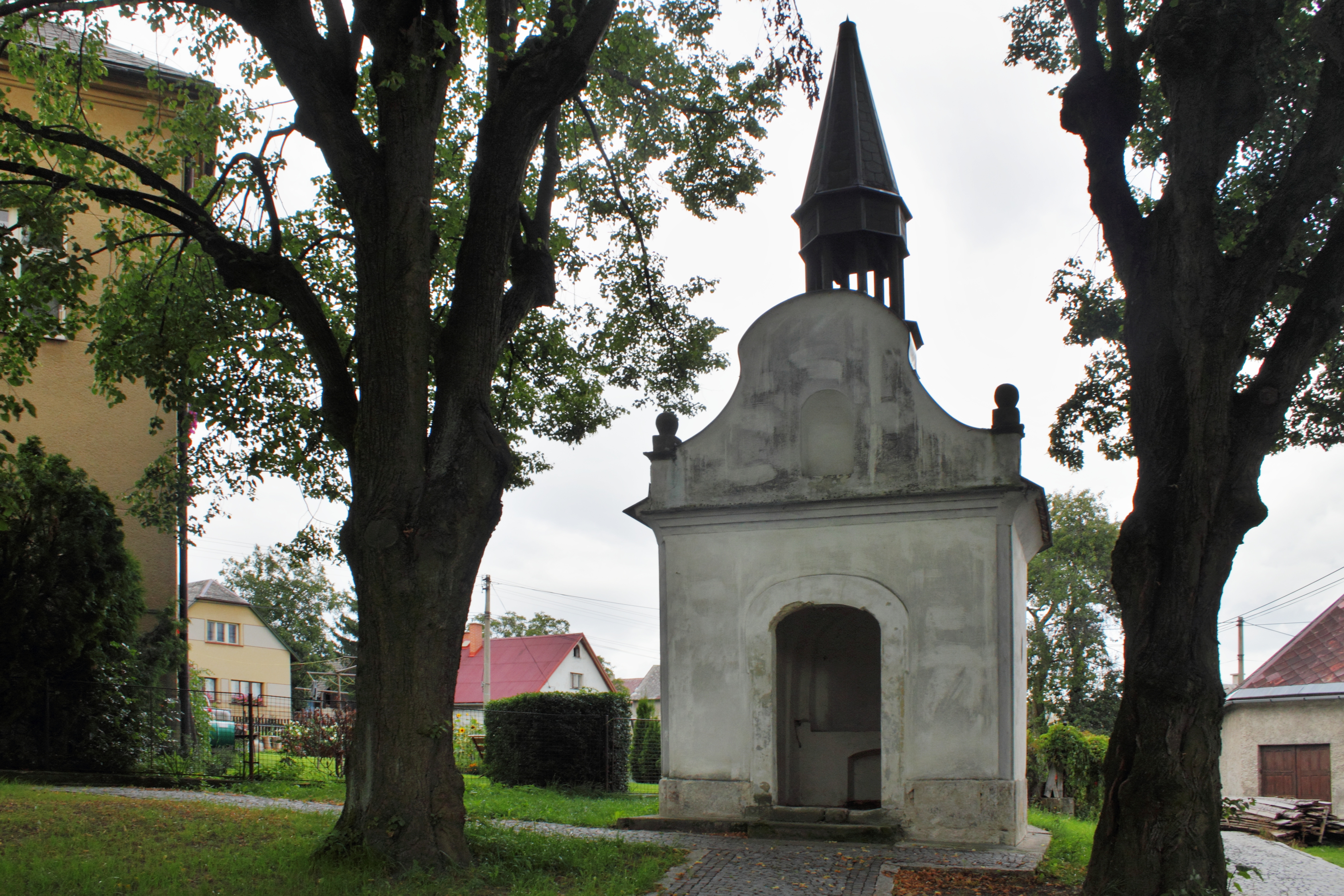 Kaple na návsi v Odolenovicích